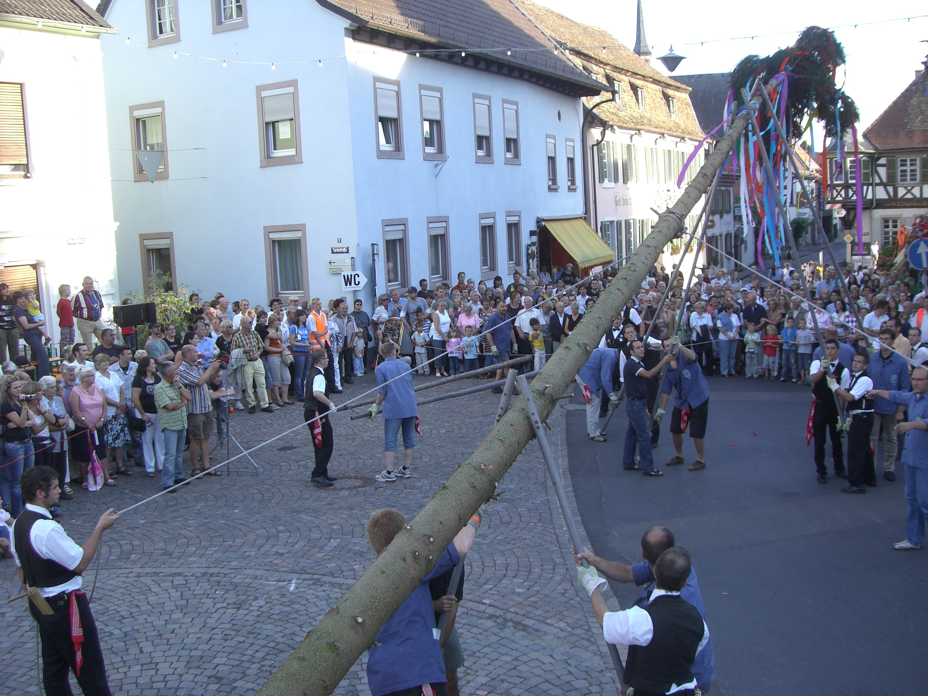 Der Kerwebaum wird bei der Eröffnung der Deidesheimer Weinkerwe von den Kerwebuwe gestellt